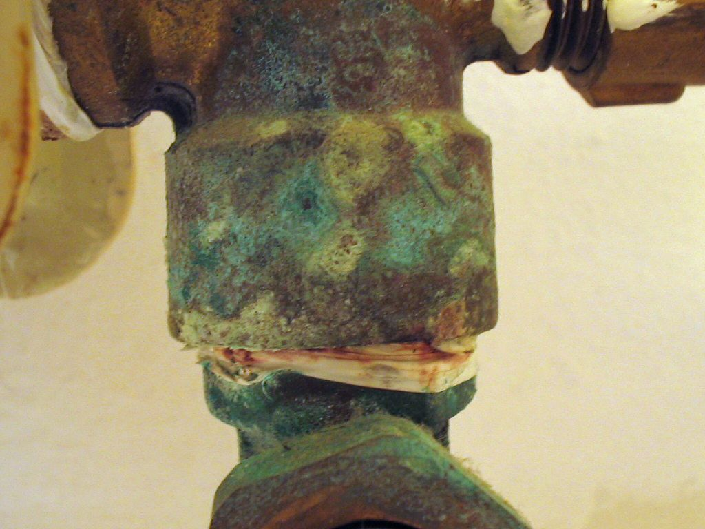 Koper slaat groen uit bij corrosie. Schade door corrosie en andere geleidelijk werkende invloeden is niet gedekt.